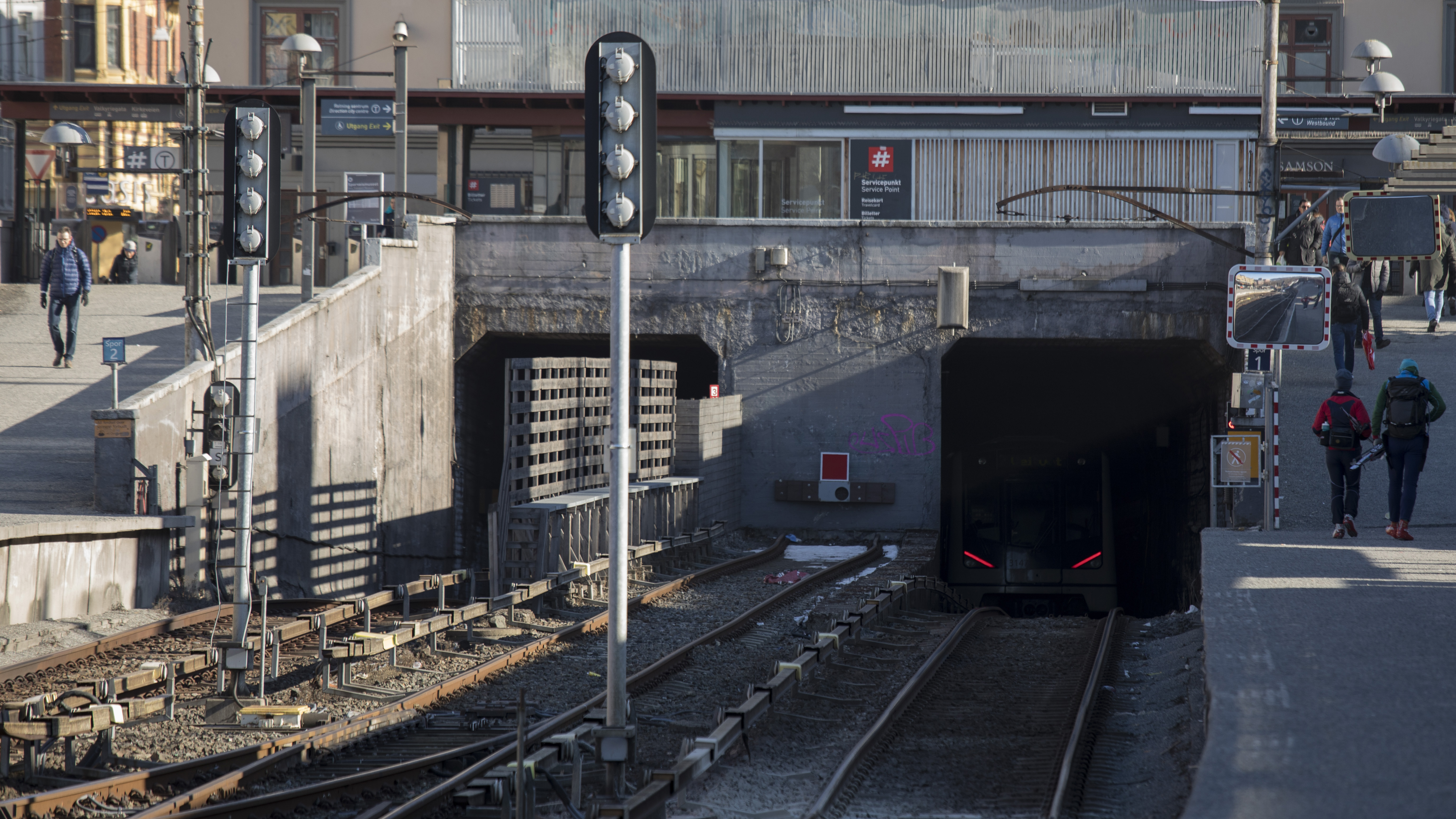 Inngangen til fellestunnelen ved Majorstuen stasjon.